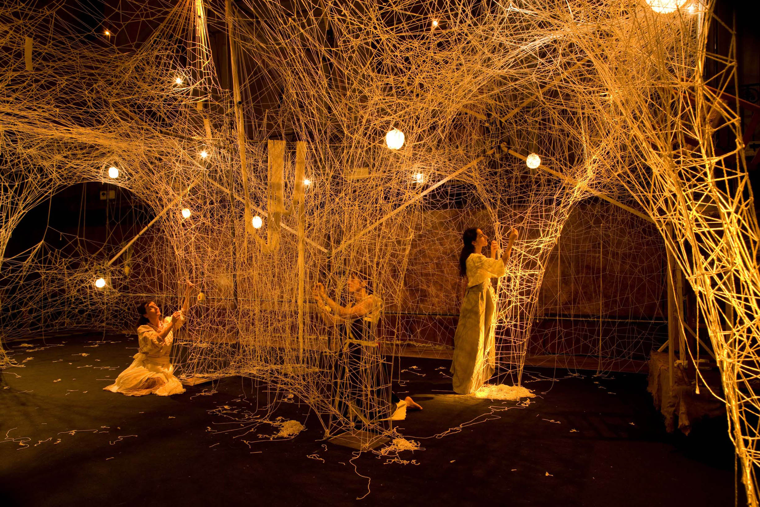 COSA DEVE FARE NAPOLI PER RIMANERE IN EQUILIBRIO SOPRA UN UOVO di Enrique Vargas - regia Enrique Vargas produzione Napoli Teatro Festival Italia - Teatro de los Sentidos - prima assoluta